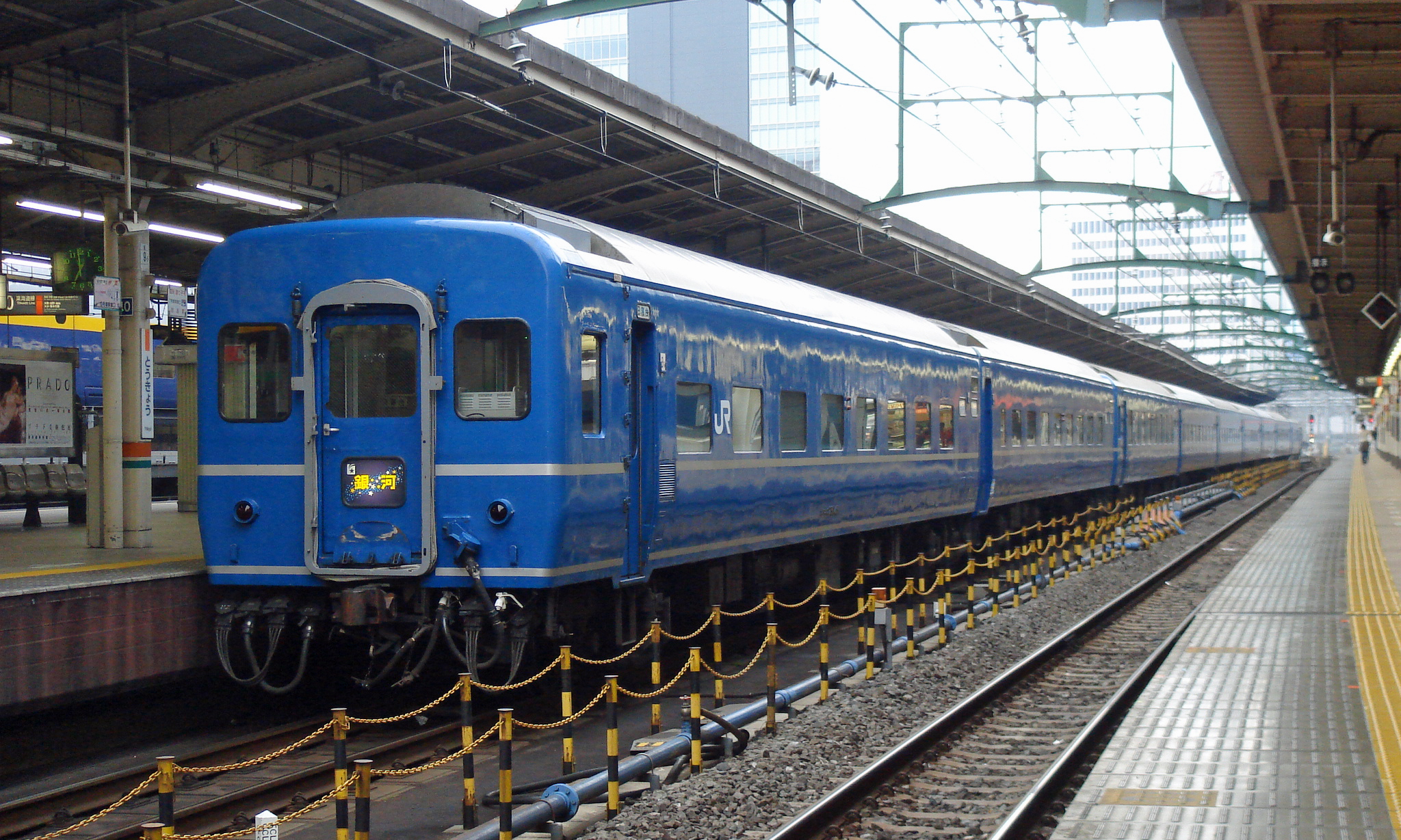 東京駅回送待ちの24系急行銀河（画像レタッチ＆トリミングのみ、縮小なし）